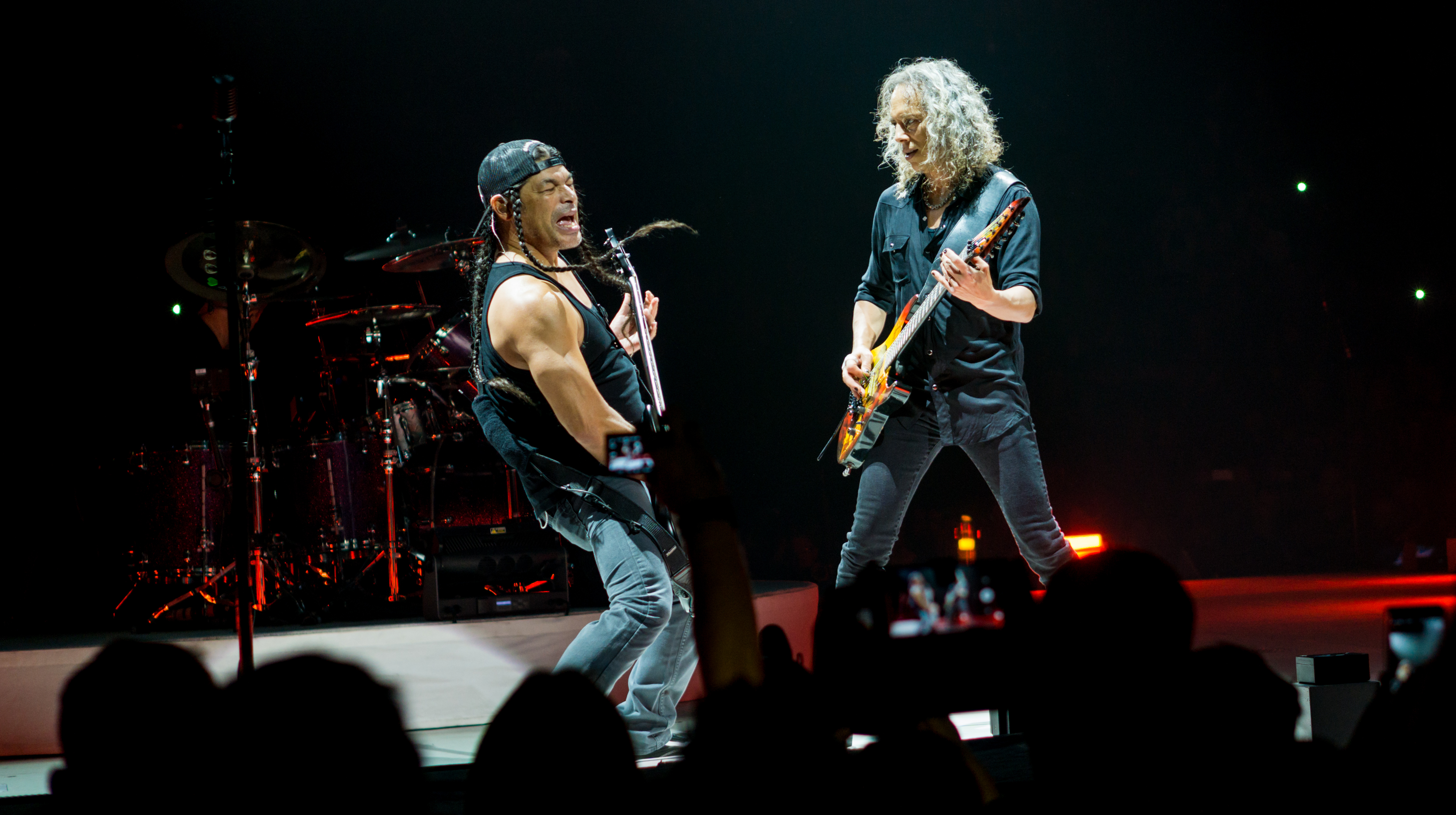 MetallicaO2221017-64